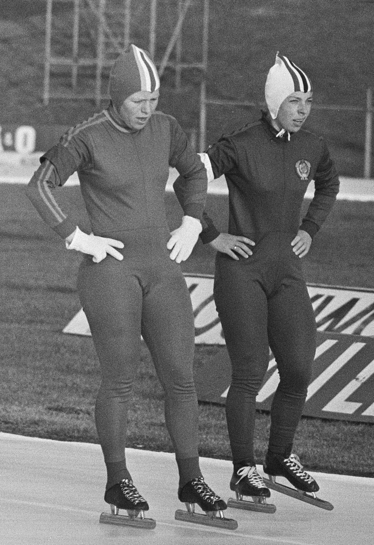 Annie Borckink (left) and Tatyana Shelekhova